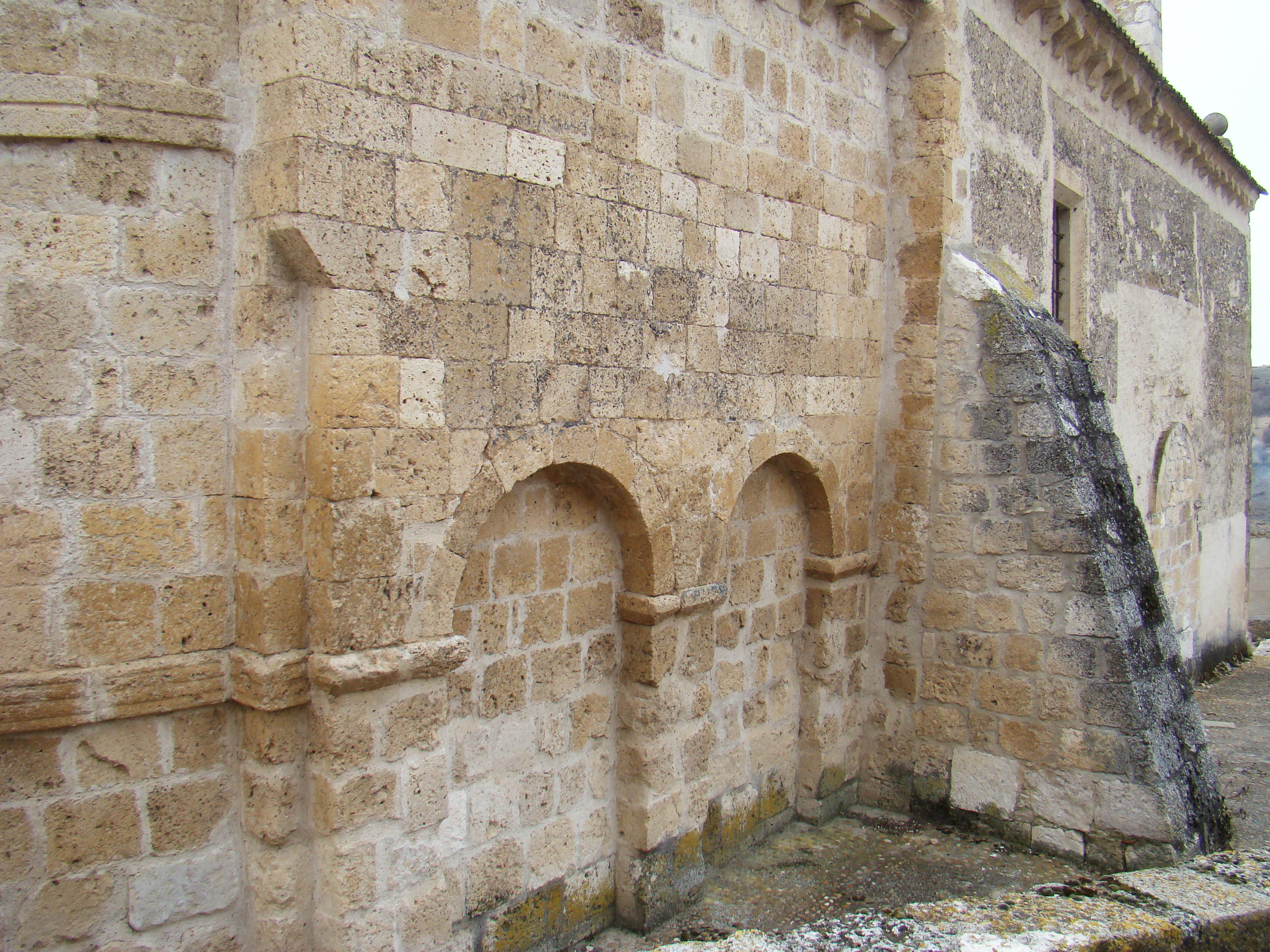 Iglesia románica de la Vera Cruz o Invención de la Cruz en la localidad segoviana de Cuevas de Provanco. Fue restaurada en 1991. Único contrafuerte en el muro norte, en el lugar donde se unen el presbiterio y la nave.